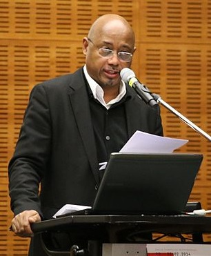 Welche Formen der Solidarität und Kooperation in einer globalisierten Welt können nachhaltige Veränderungen bewirken? Dokumentation der zweiten Frankfurter Hilfe-Konferenz, 20.-22.2.2014. Raoul Peck (Filmemacher, Haiti)